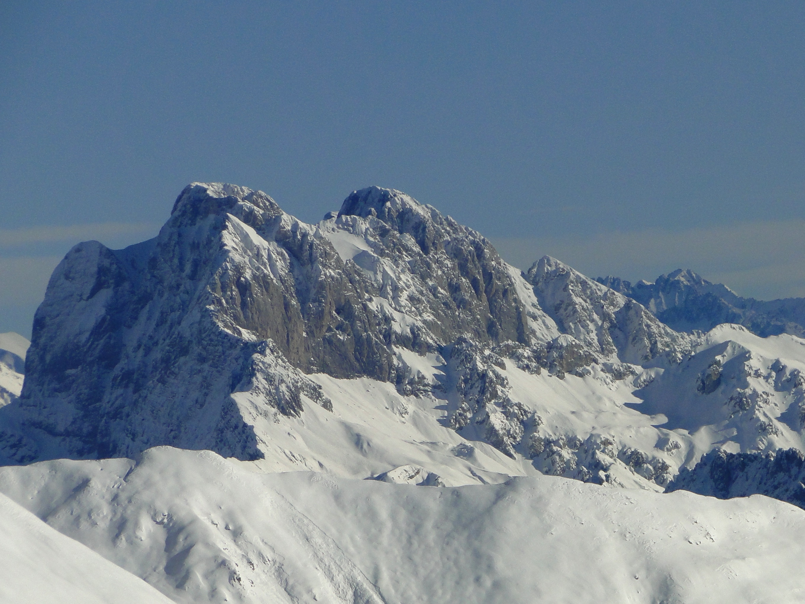 La Presolana vista dalla cima di Grem, Prealpi Bergamasche (BG)